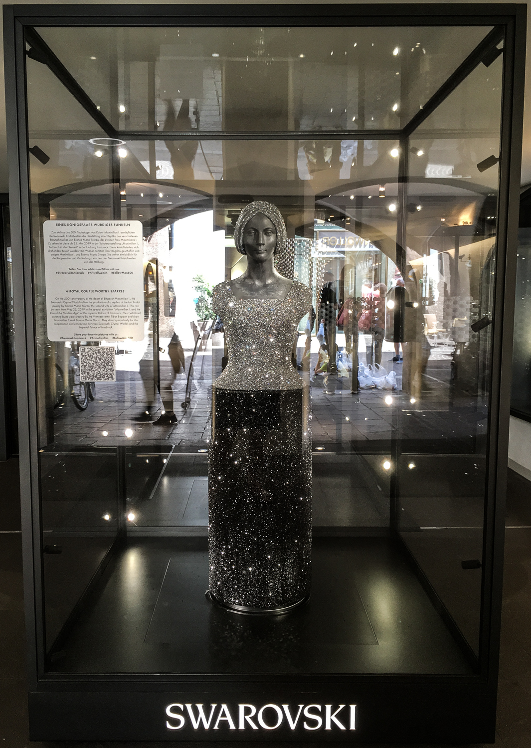 Gasthaus zur goldenen Rose: Anlässlich des Jubiläumsjahres 2019 von Kaiser Maximilian I. haben die Goldschmiede der Swarovski Kristallwelten in Wattens, Tirol, eine originalgetreue Replika des Brautschmuckes von seiner zweiten Ehefrau, Bianca Maria Sforza hergestellt. Diese ist in der Herzog Friedrich Straße 39 in Innsbruck in Österreich, Europäische Union ausgestellt.